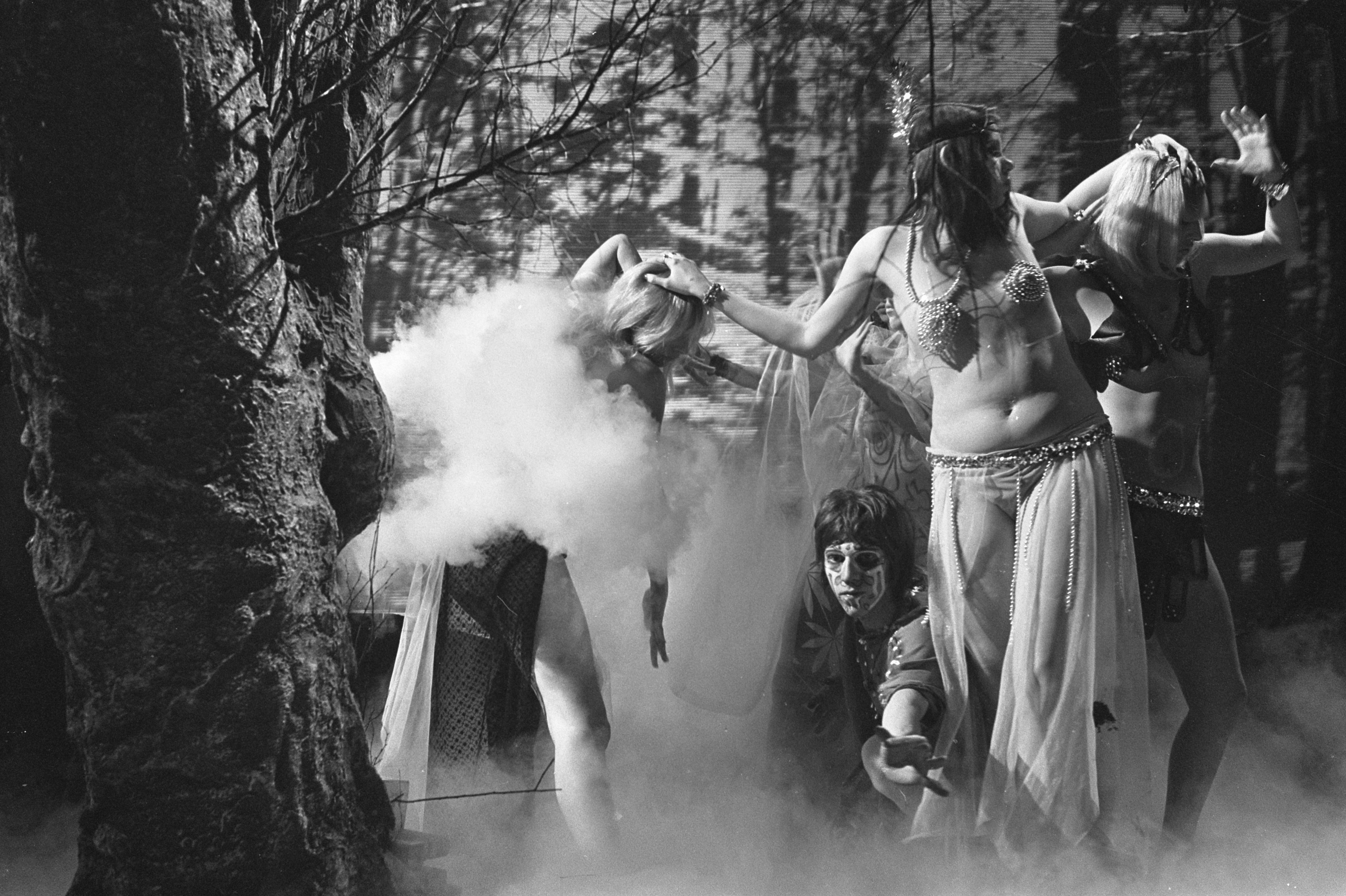 Collectie / Archief : Fotocollectie Anefo Reportage / Serie : [ onbekend ] Beschrijving : Hoepla ...... voor VPRO-TV. Het damesgroepje "Kunst baart kracht", waarin onder meer Laurie Langenbach danste. Datum : 8 januari 1968 Trefwoorden : dans, programma's, televisie Persoonsnaam : Kunst Baart Kracht Instellingsnaam : VPRO Fotograaf : Steinmeier, Hans / Anefo Auteursrechthebbende : Nationaal Archief Materiaalsoort : Negatief (zwart/wit) Nummer archiefinventaris : bekijk toegang 2.24.01.05 Bestanddeelnummer : 920-9750